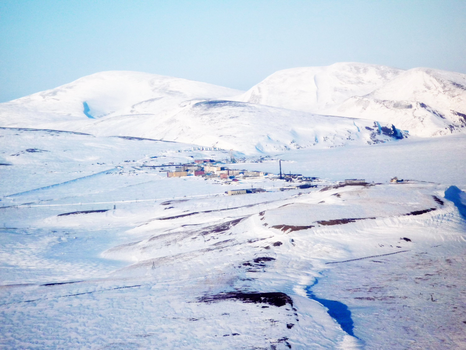 Беринговский